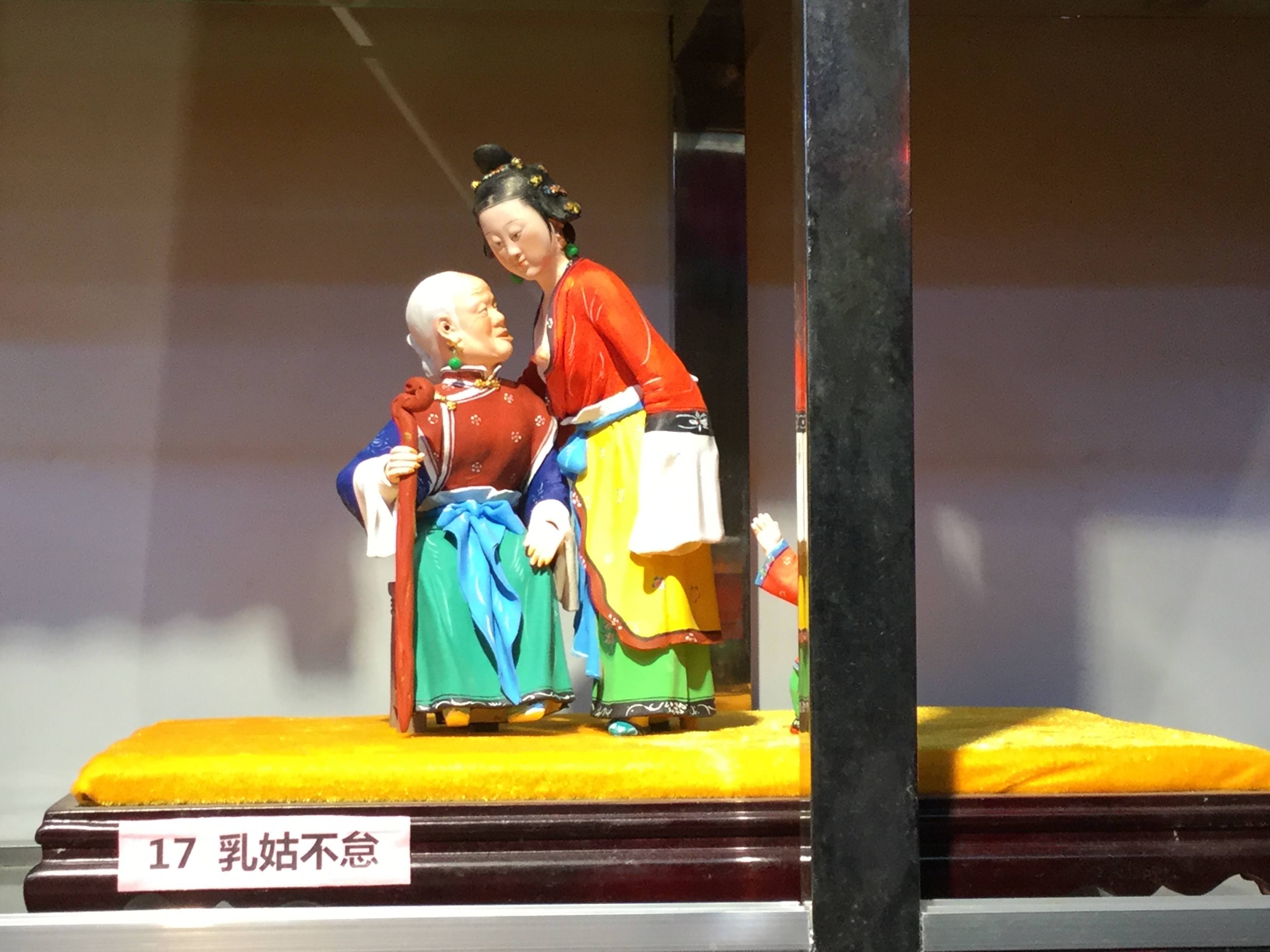 翁仔灯《乳姑不怠》，摄于2018年3月2日。